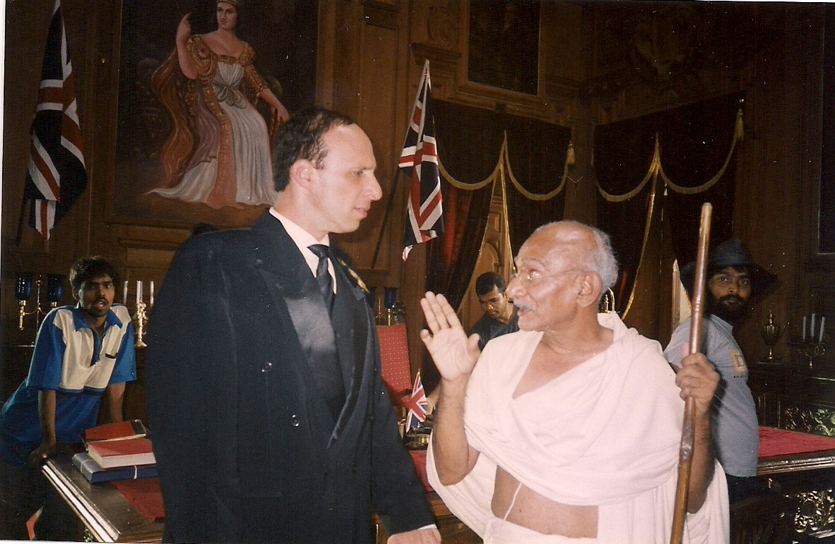 גיל אלון בתפקיד המושל בסרט "האגדה על בהגד סינג"